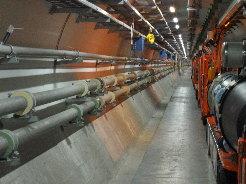 Tunnel des im Bau befindlichen Teilchenbeschleunigers LHC - Der gesamte Tunnel wird mit einer Kette aus supraleitenden Magneten gefüllt, die die Teilchen auf ihrer Kreisbahn von fast 27 km Umfang halten sollen. Auf der rechten Seite kann man die Transportvorrichtung erkennen, mit der die Magnete im Tunnel transportiert werden sollen. Ganz vorne liegt ein Magnet zur Korrektur der Teilchenbahn.